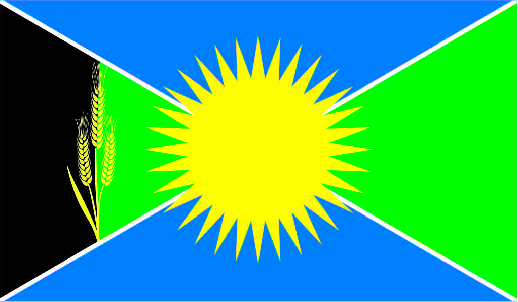 Прапор Чемеровецької ОТГ